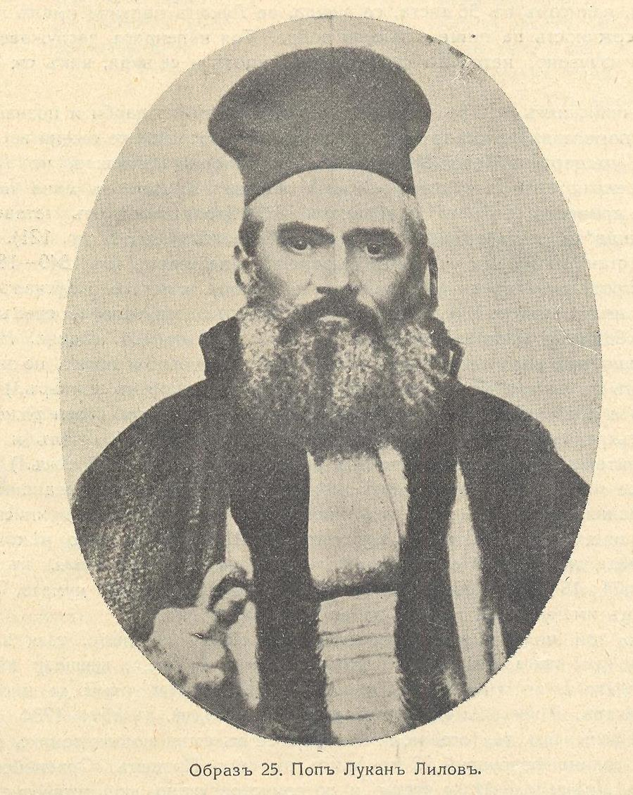 Ловеч и Ловчанско, книга 3, 1931, стр. 121 - Поп Лукан Лилов